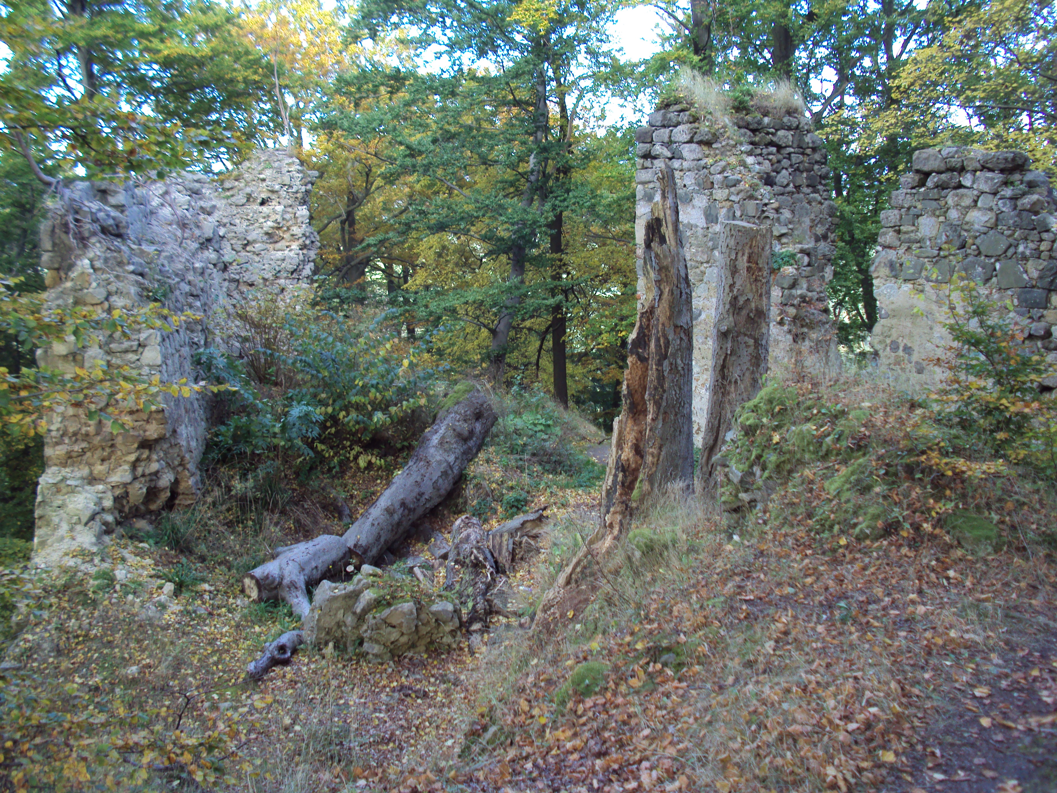 Zřícenina hradu Děvín u Hamru na Jezeře